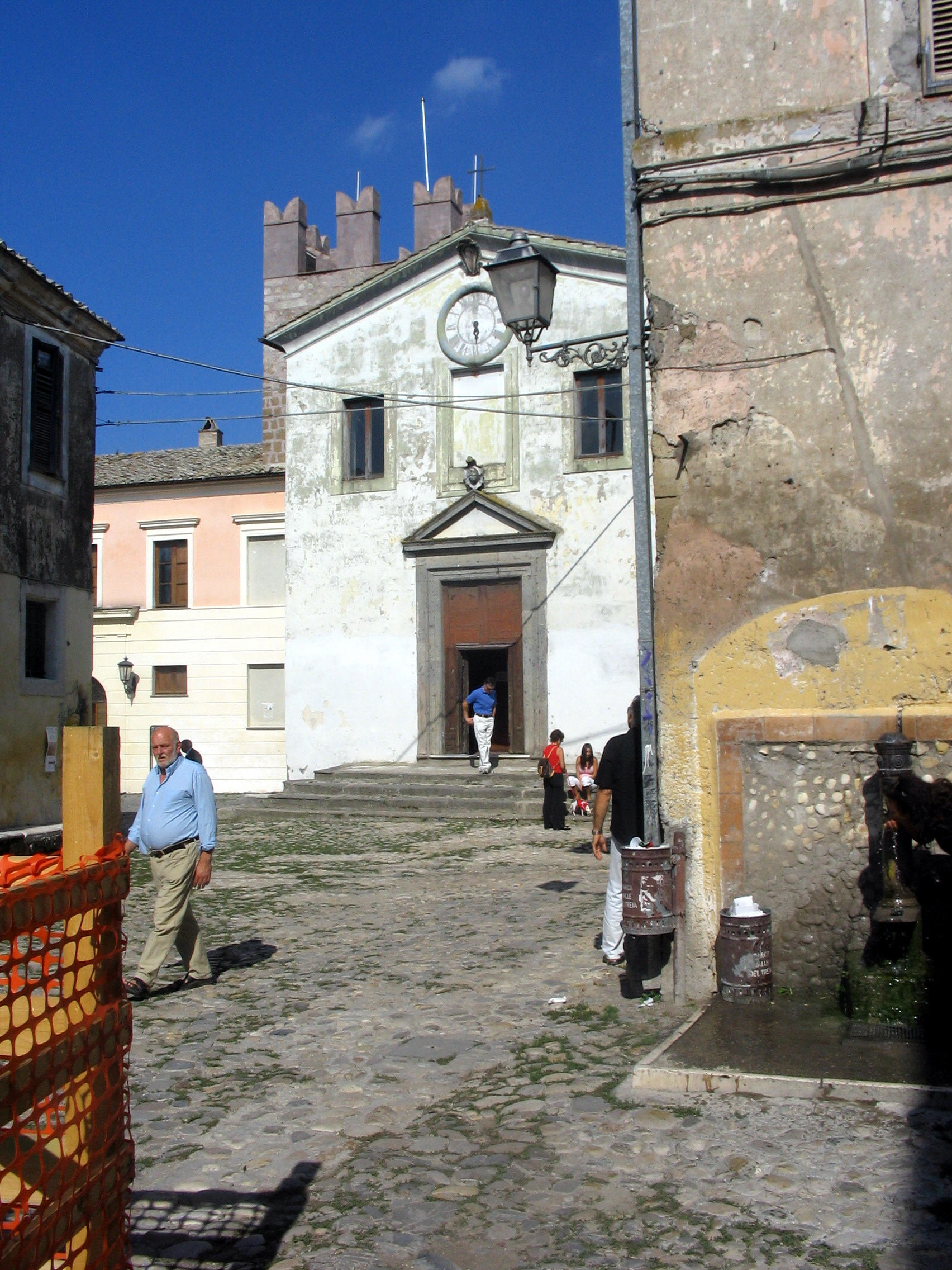 Calcata, Lazio, Italia